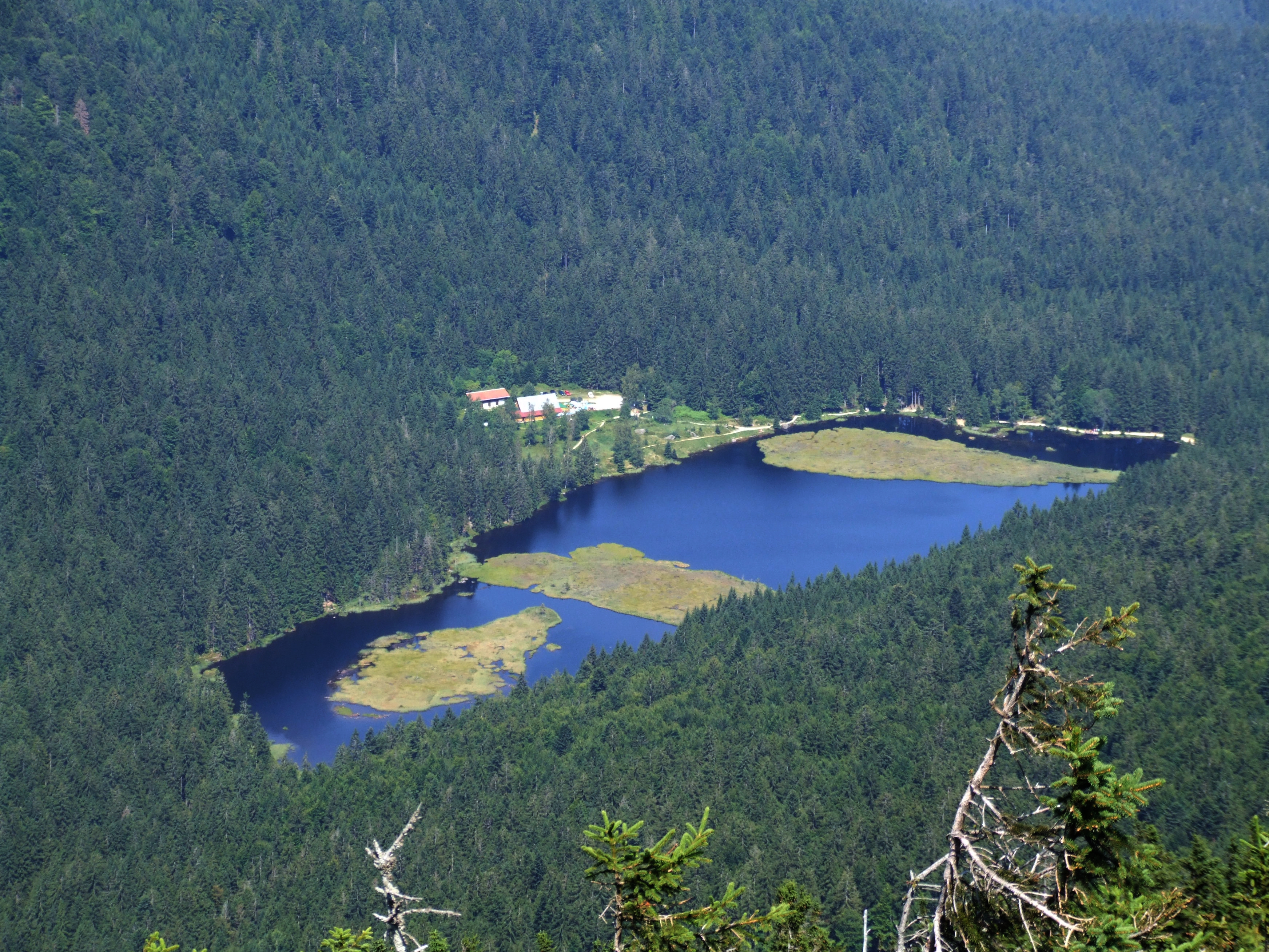 Kleiner Arbersee - direkter Blick vom Großen Arber; deutlich erkennbar die drei schwimmenden Inseln